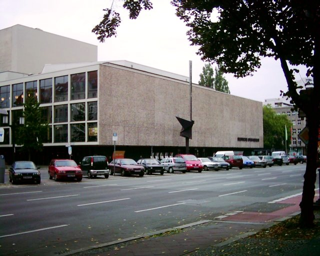 Berlin, Germany: Deutsche Oper Location: Berlin-Charlottenburg, Bismarckstraße